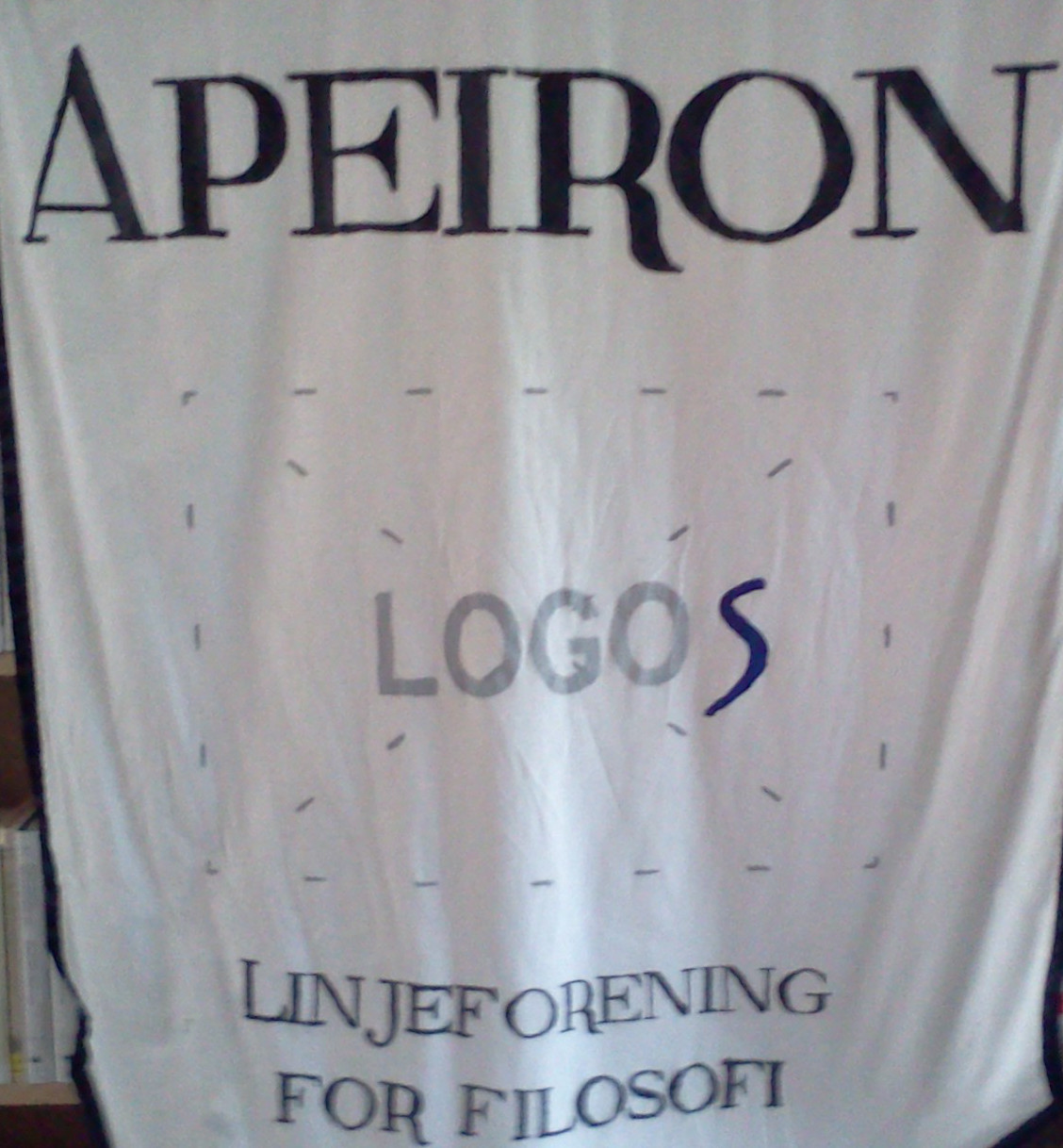 Apeirons logo